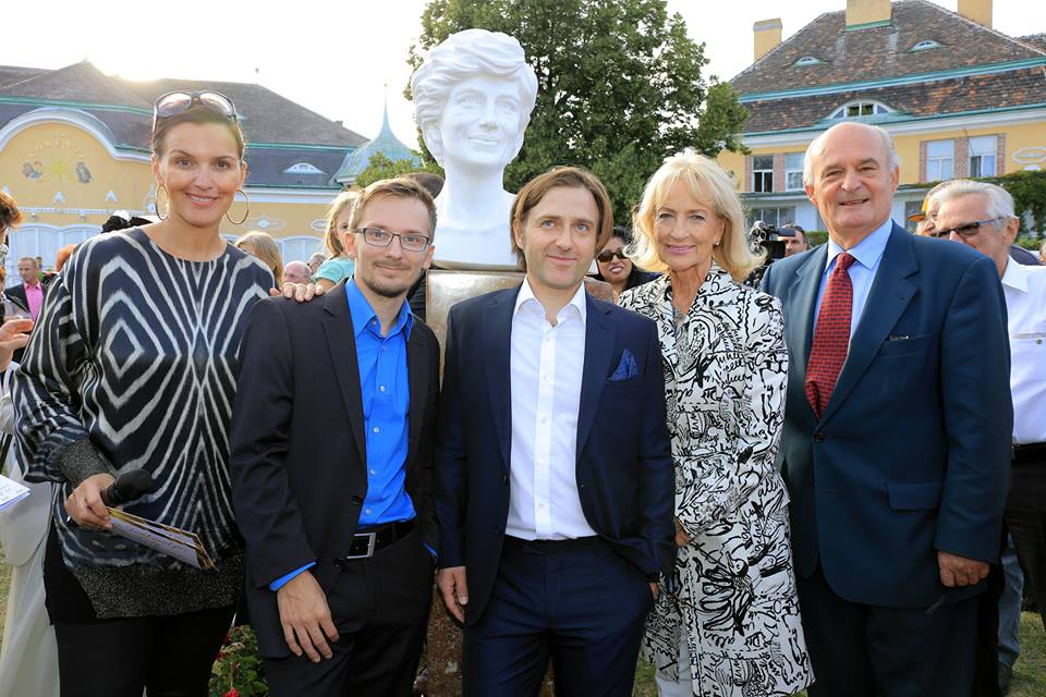 Enthüllung des Lady Diana - Denkmals